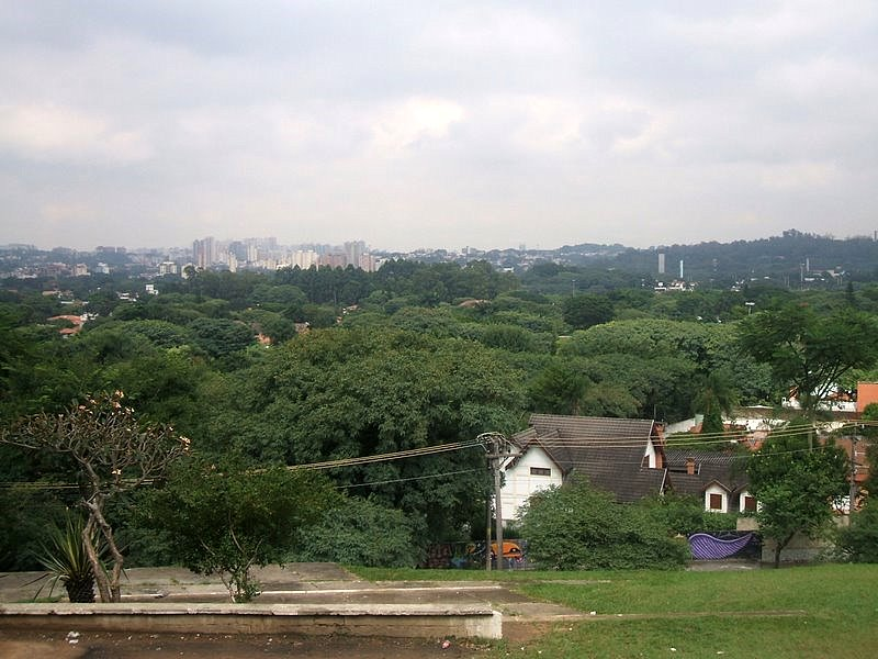 Vista do Alto de Pinheiros, a partir da Praça do Pôr-do-Sol, em São Paulo, Brasil.